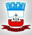 Brasão de Armas do Município de Pedrão, Bahia